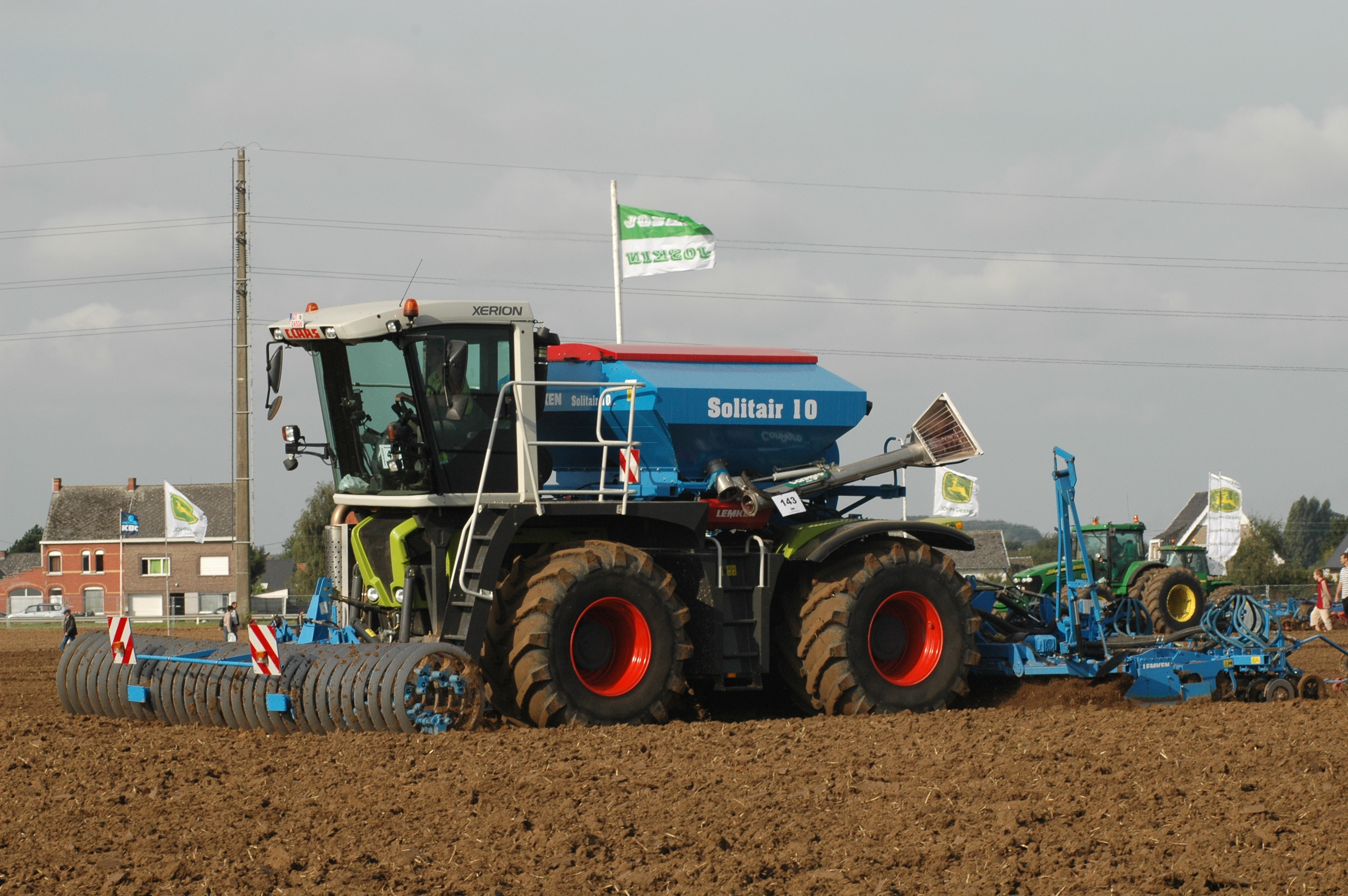 Claas Xerion 3300 Saddle Trac mit Lemken-Frontpacker und pneumatischer Drillmaschine Solitair 10 von Lemken (Saatguttank im Aufbauraum des Xerion), Werktuigendagen 2005